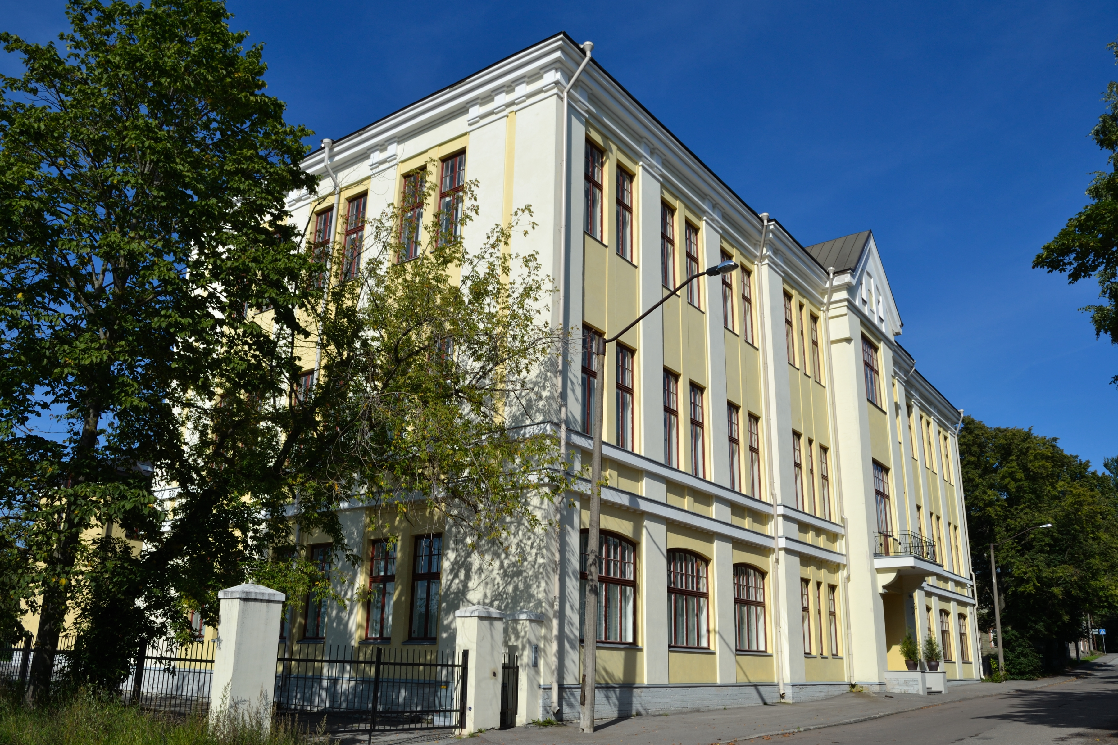 Tallinn, Bekkeri laevatehase haldushoone, 1912-1914